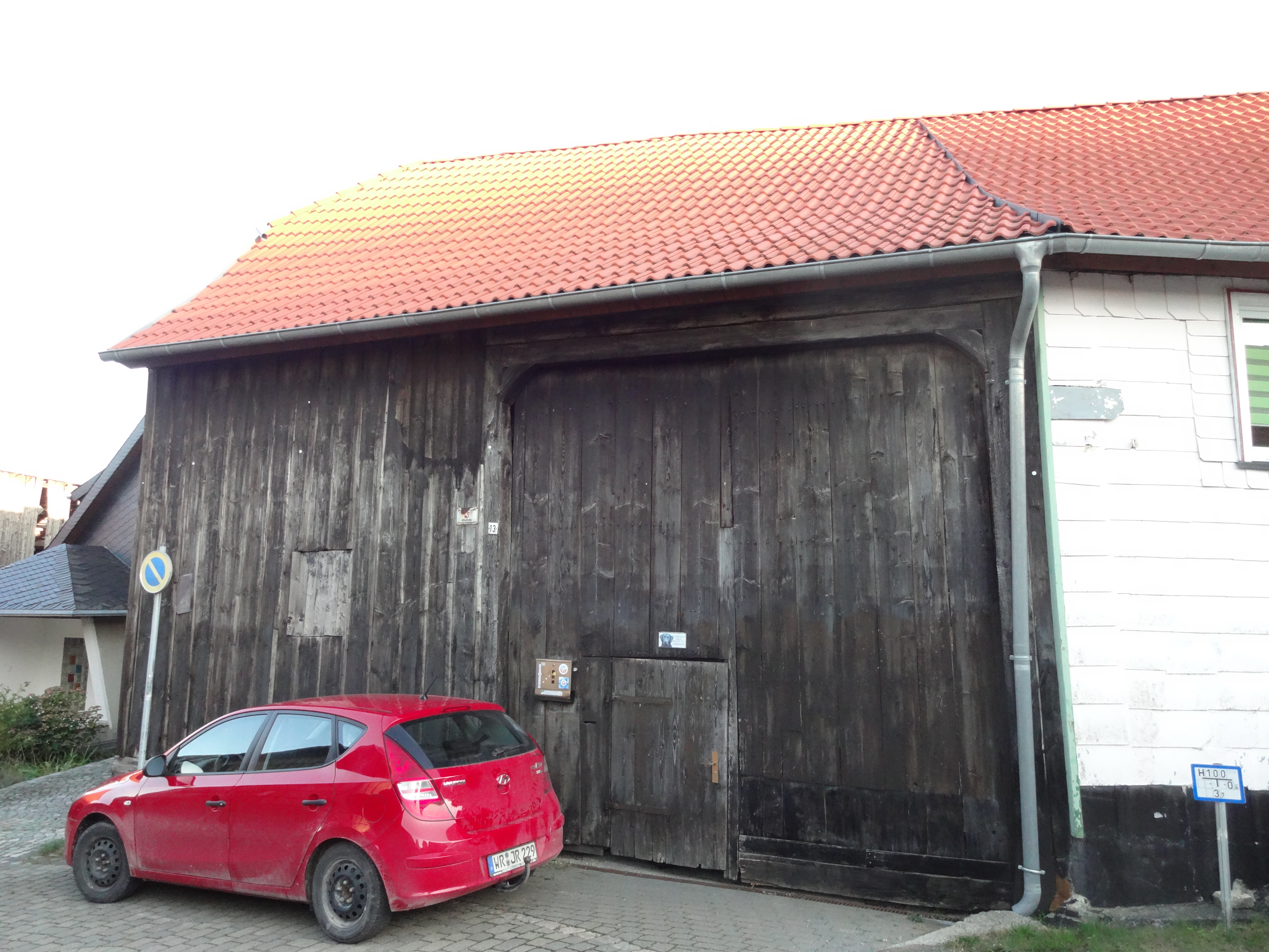 denkmalgeschützte Scheune in der Straße Oberdorf 13 in Heimburg